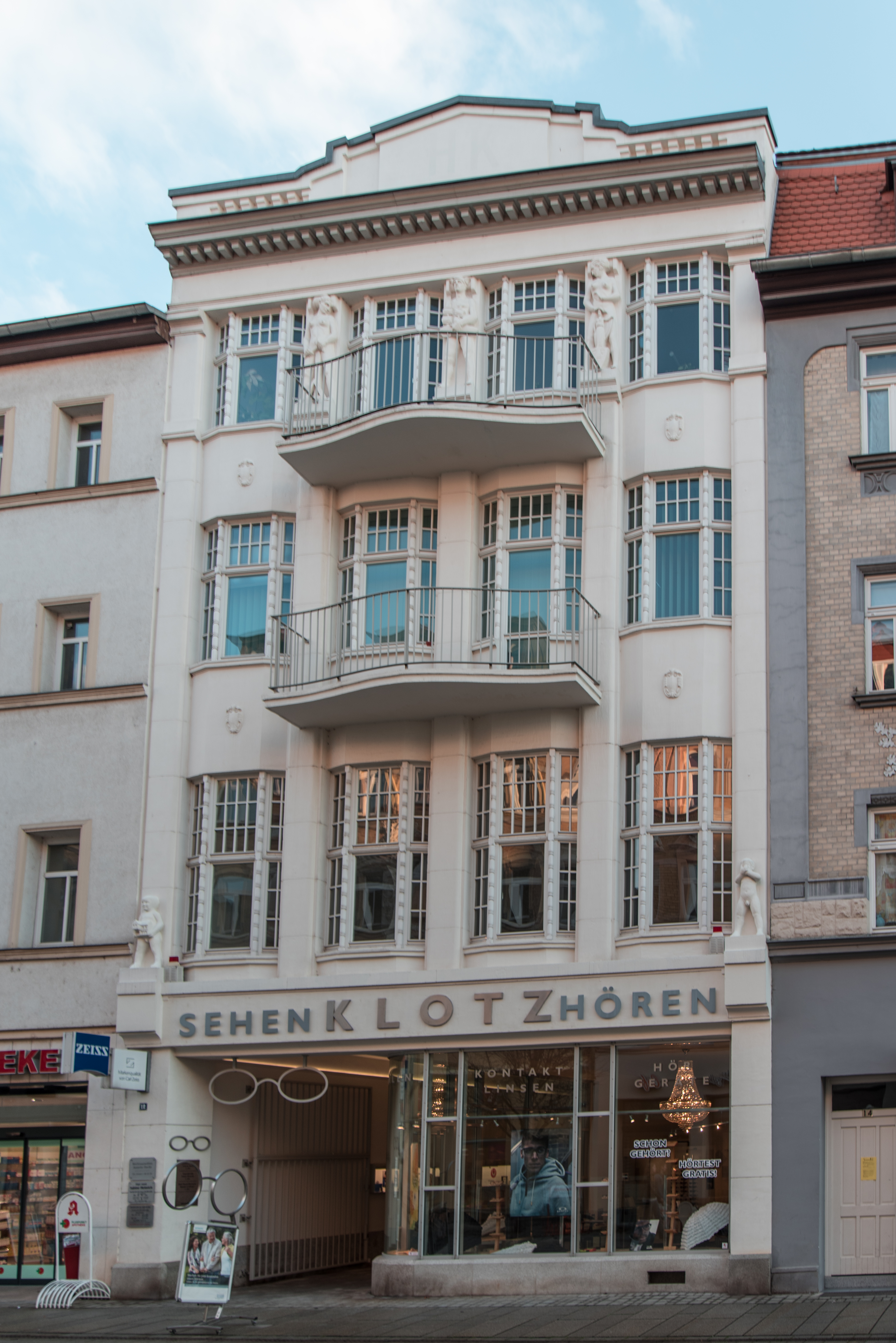 Weißenfels, Jüdenstraße 12